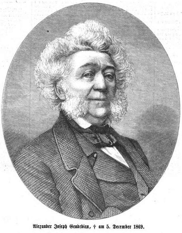 Alexandre Joseph Gendebien, belgischer Staatsmann im 19. Jh.